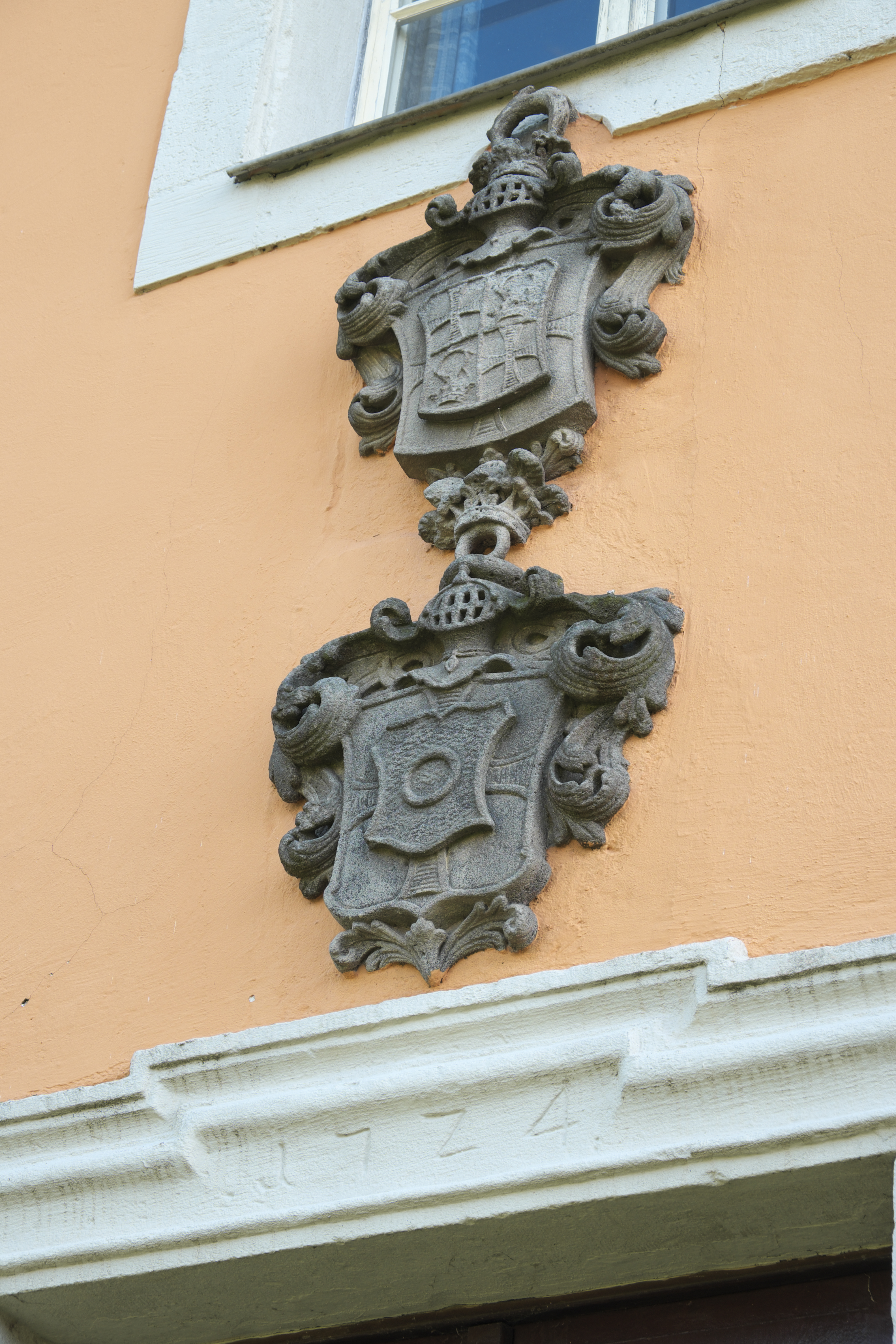 Pfarrhaus neben der katholischen Pfarrkirche St. Petrus und Paulus in Halsbach, einem Ortsteil von Dürrwangen im Landkreis Ansbach (Mittelfranken/Bayern), Wappen des Deutschen Ordens über dem Eingang